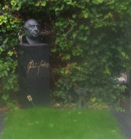 Grinzinger Friedhof-Ludwig Weber